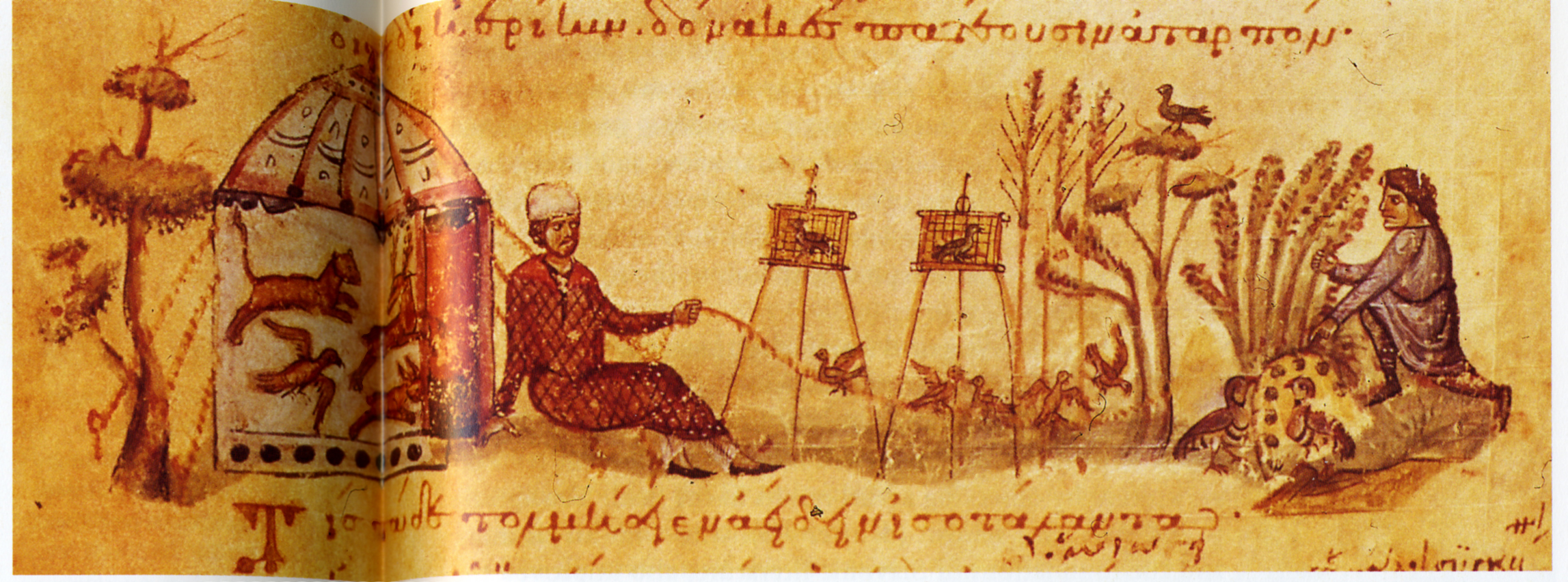 Птицелов Псевдо-Оппиана Кинегетика. XIв. Темпера на пергаменте. Библиотека Маркиана. Венеция.